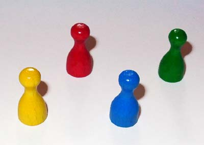 Pöppel Bild erstellt von Terabyte, Veröffentlichung unter GFDL.